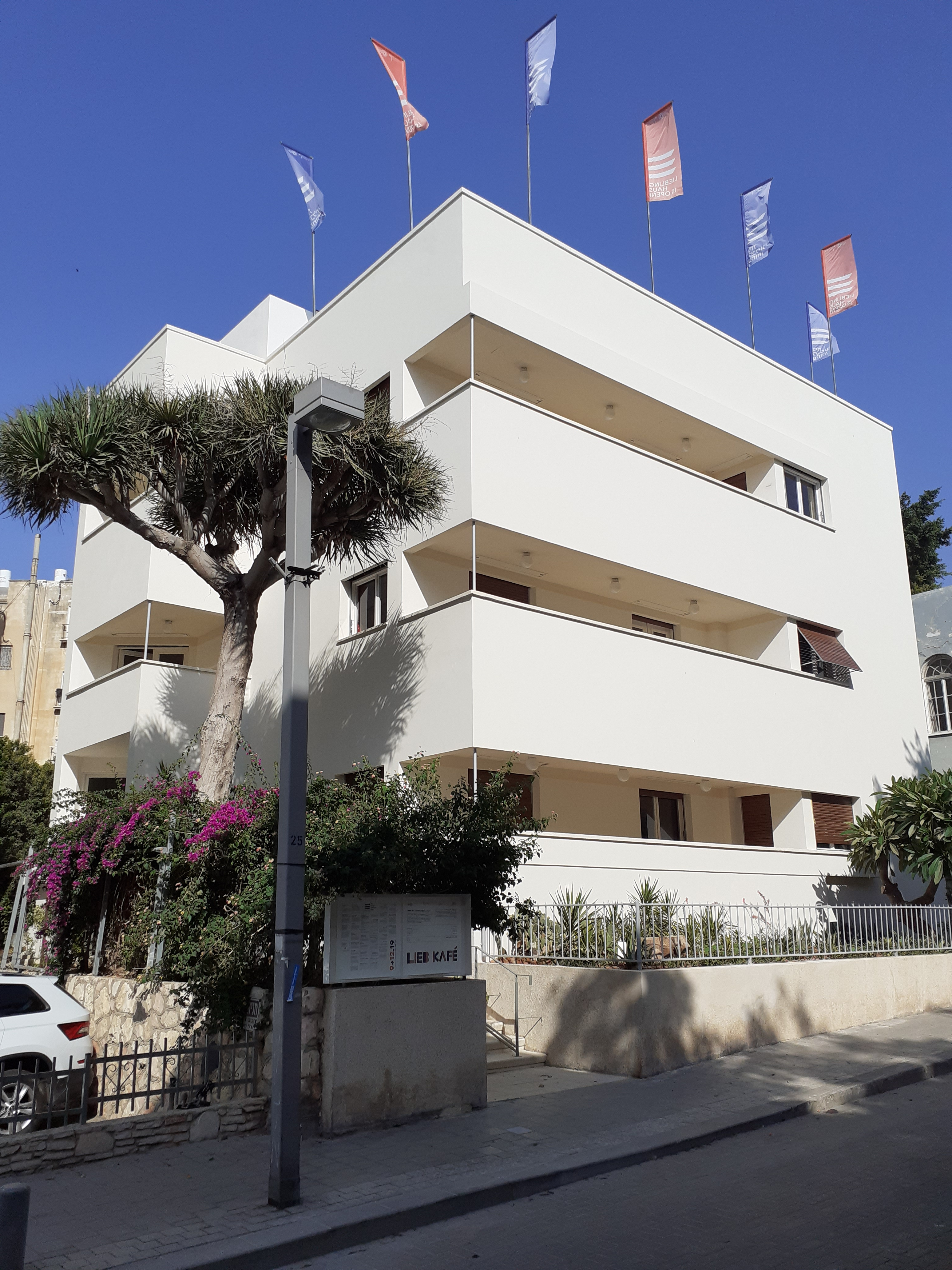 Der Beit Liebling (בֵּית לִיבְּלִינְג) / das Lieblinghaus von Westen durch den Rechov Idelson blickend, Quartier Bialik, Tel Aviv-Jaffa